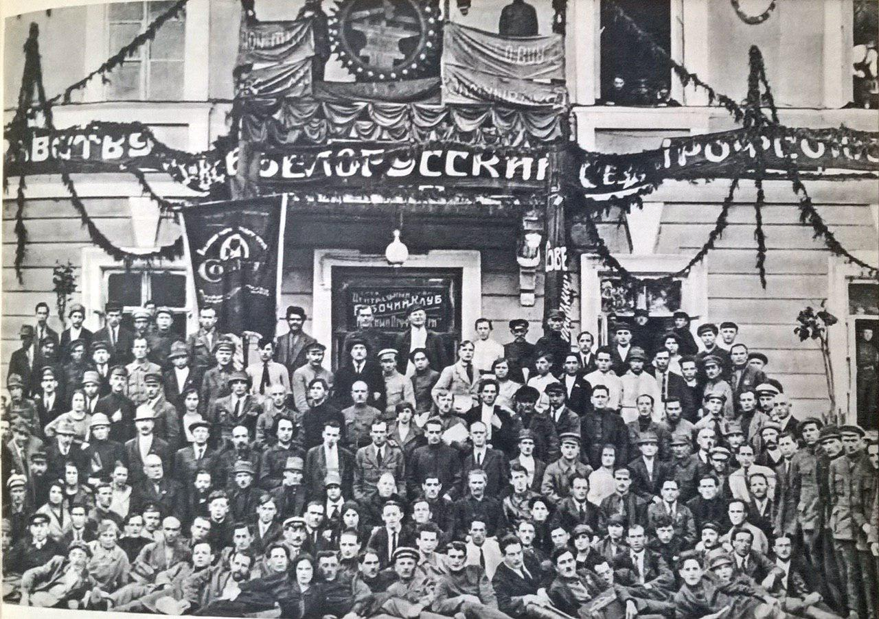 Беларуская (тарашкевіца): Менск (Miensk), пляц Высокі Рынак (plac Vysoki Rynak). Манастыр базылянаў, перабудаваны ўладамі Расейскай імпэрыі пад прысутныя месцы